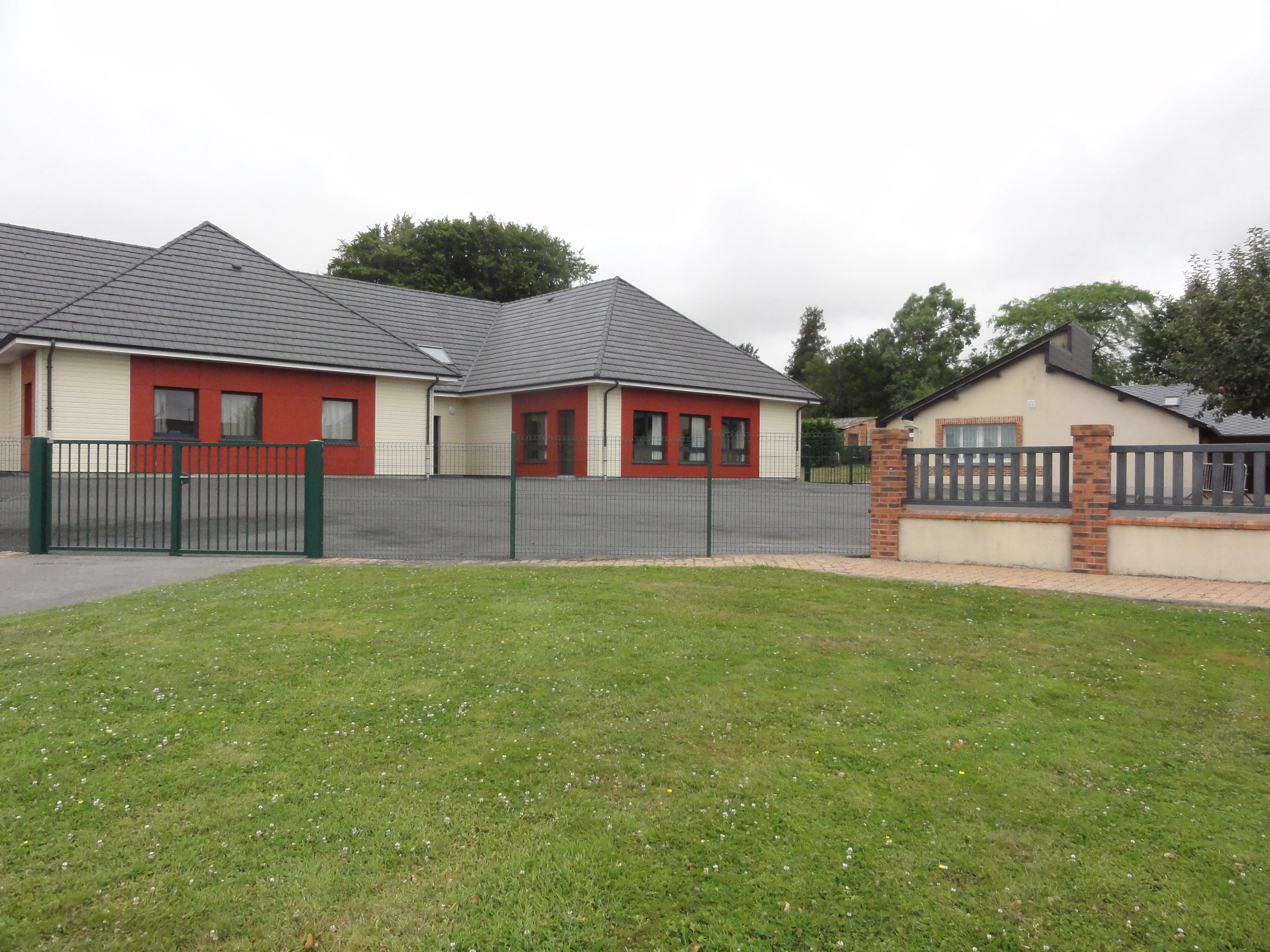 Auberville-la-Renault (Seine-Mar.) école